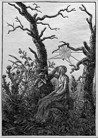 Holzstock in der Kunsthalle Hamburg